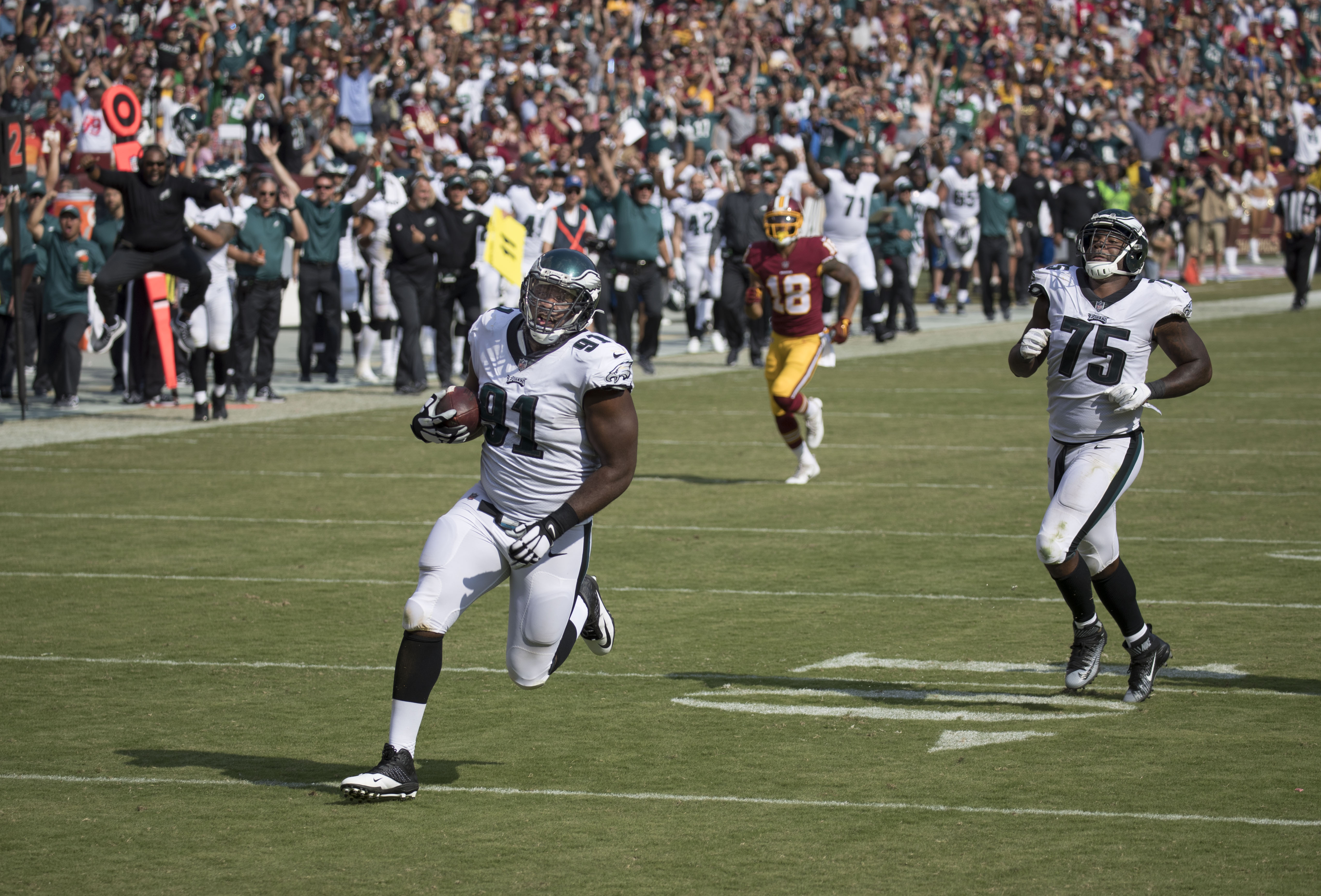 Eagles at Redskins 9/10/17